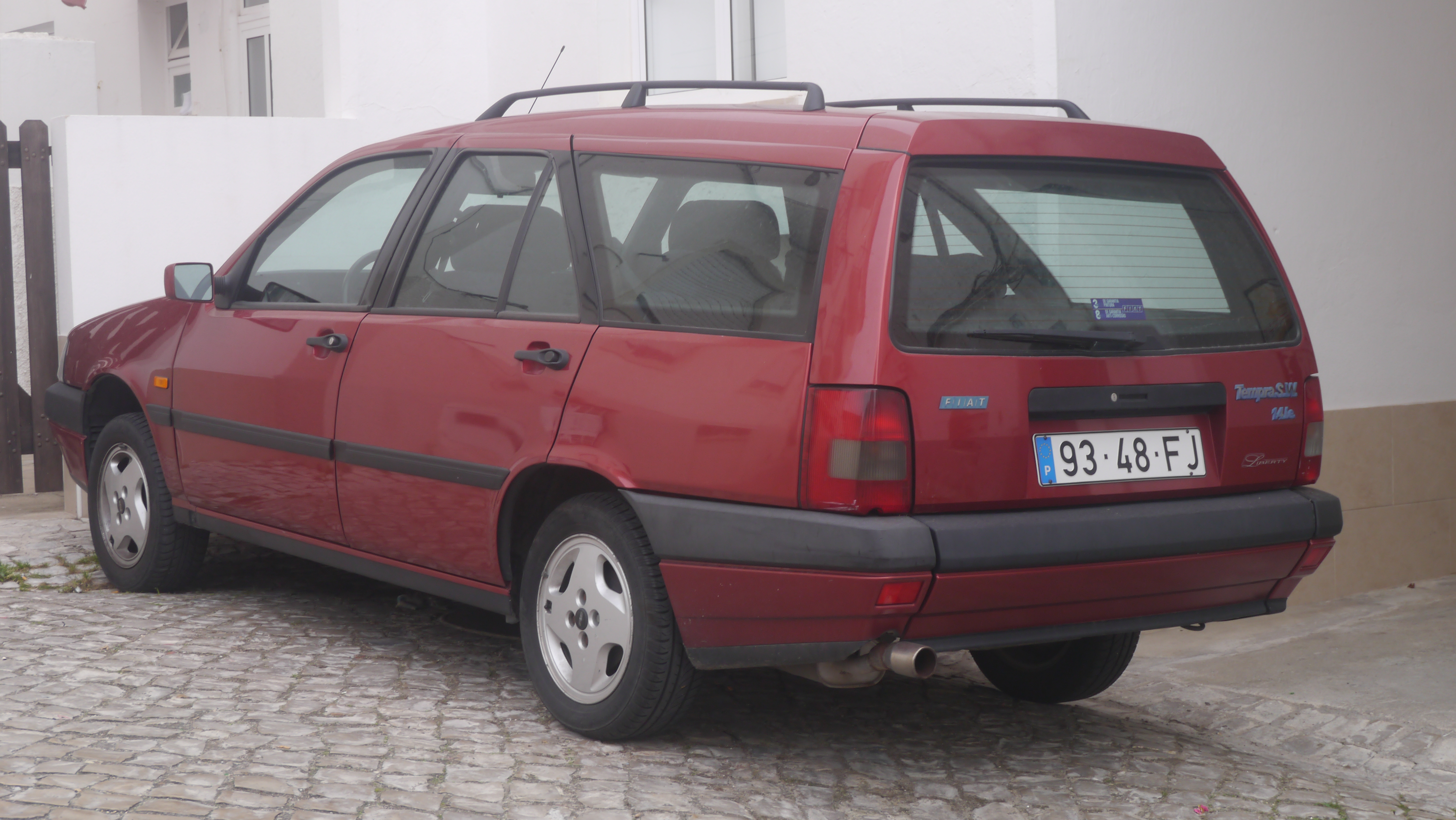 Narare, Portugal.